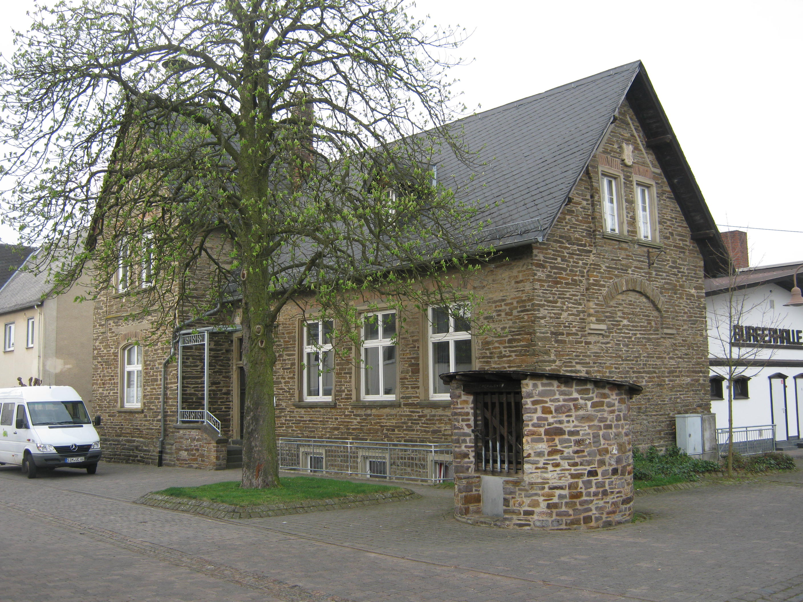 Gemeindehaus und Bürgerhalle in Morshausen